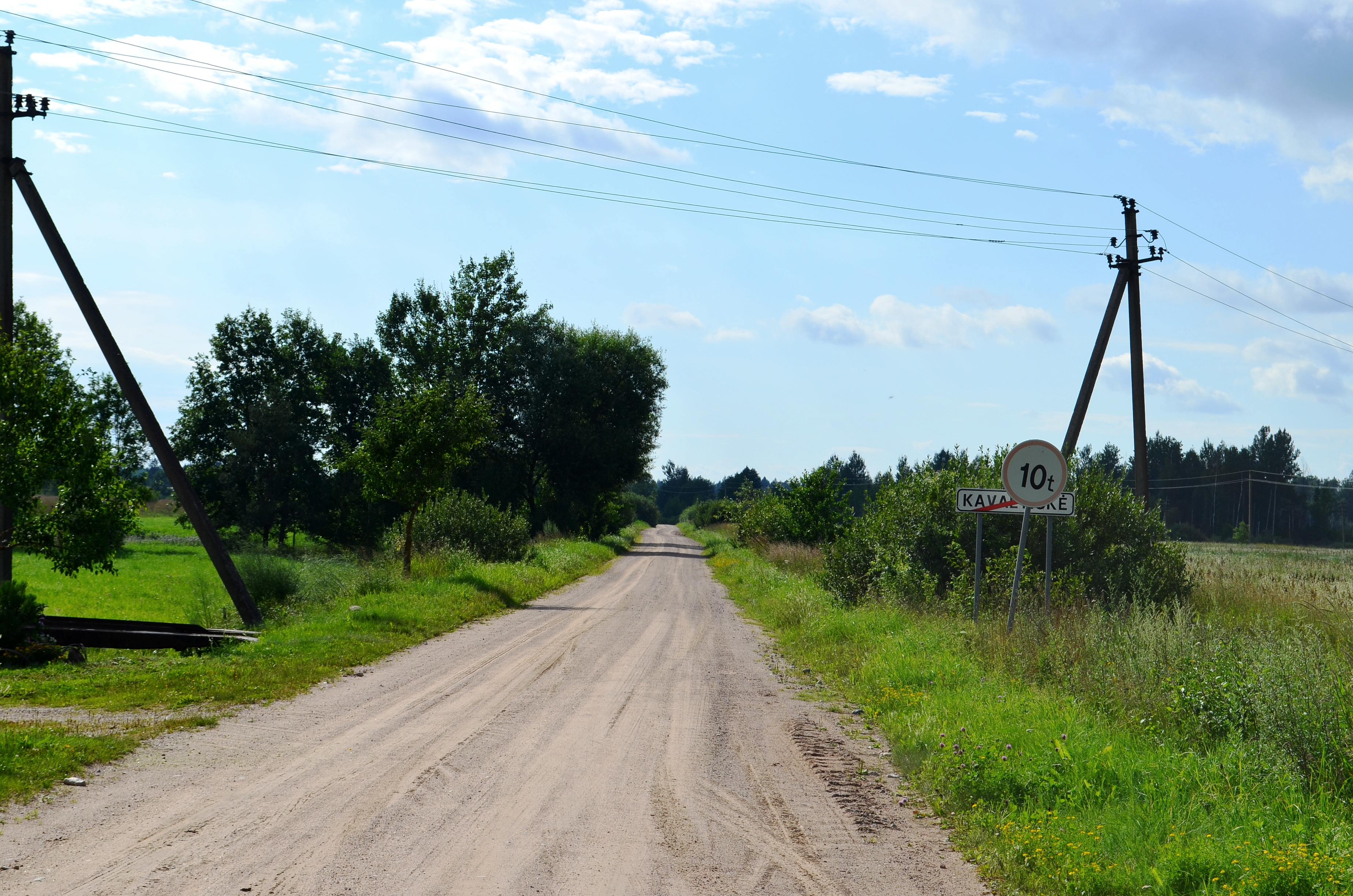 Kavaltiškės k., Adutiškio sen., Švenčionių raj.